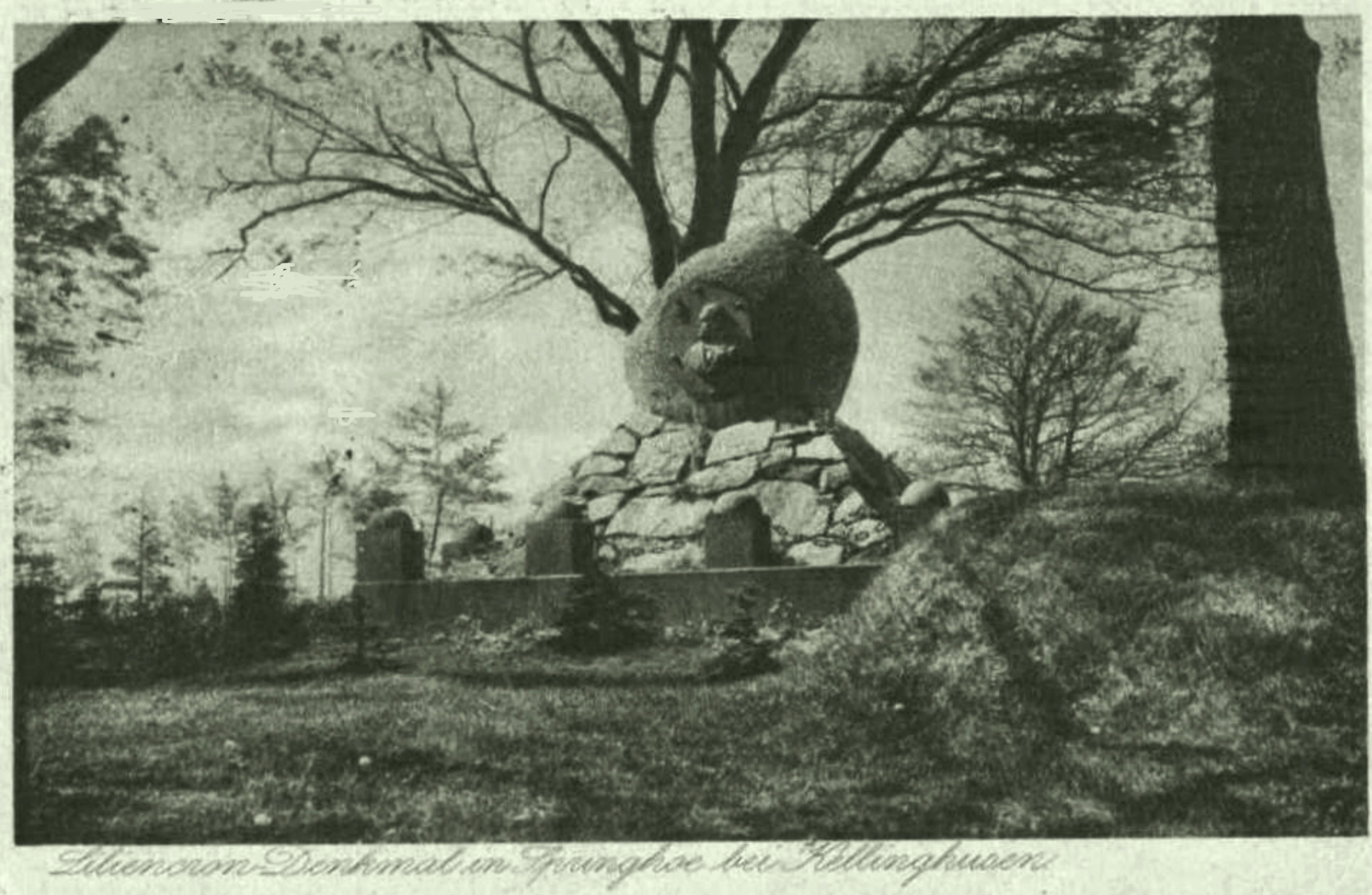 Springhoe-Liliencron-Denkmal . Relief vom Dresdner Bildhauer Clemens Grundig